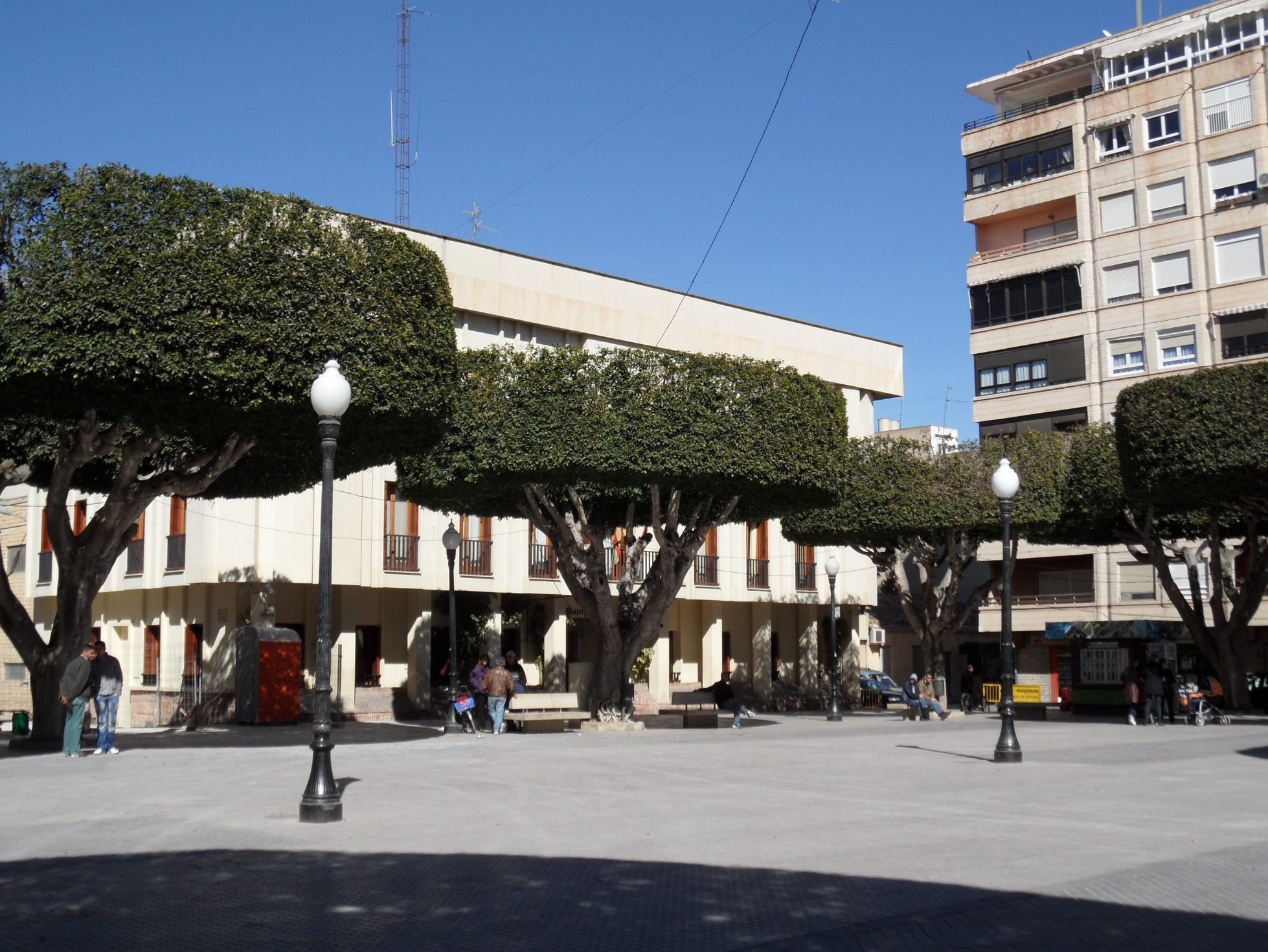 Ayuntamiento de Almoradí y plaza de la Constitución.